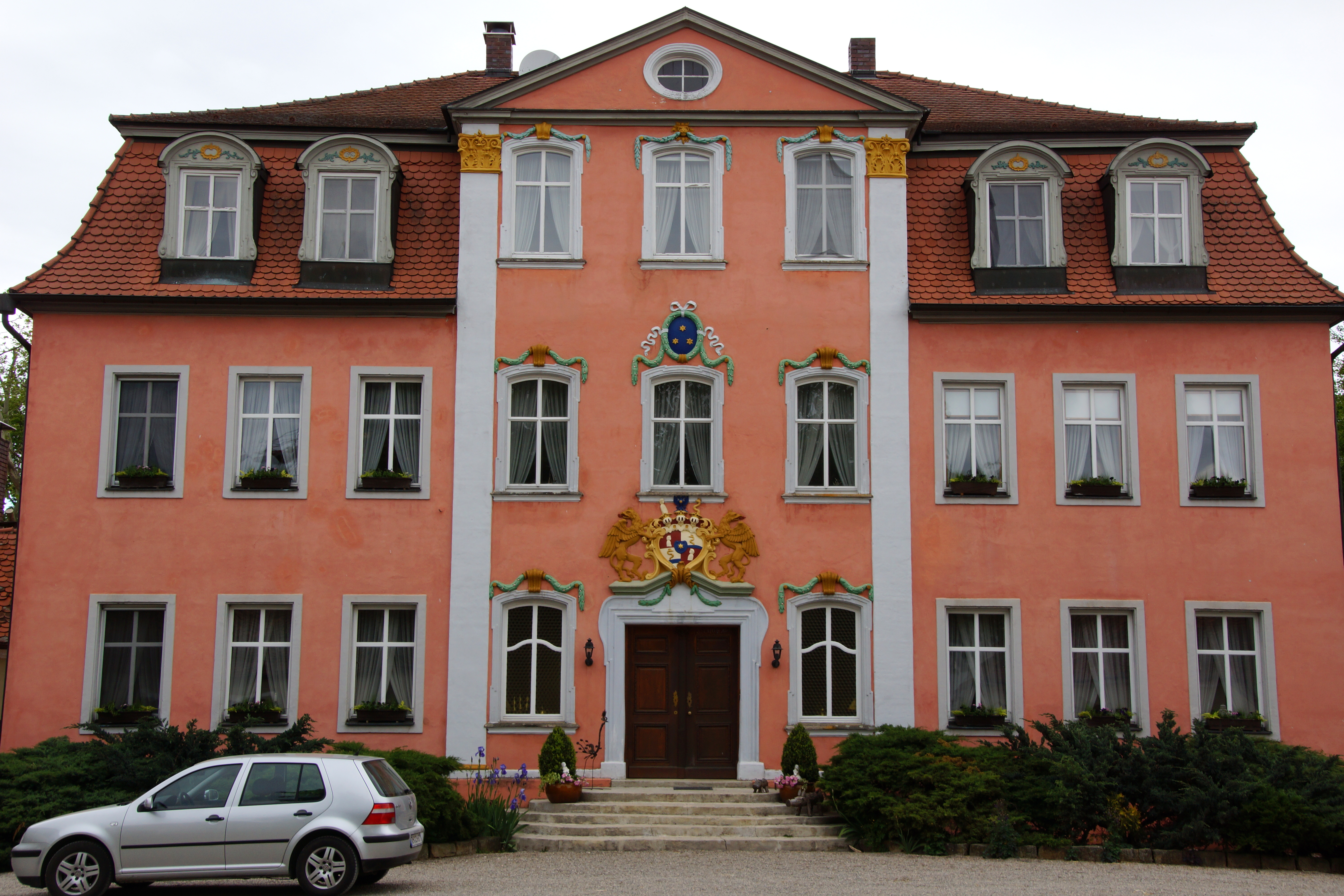 Das Schloss Mörlach bei Hilpoltstein